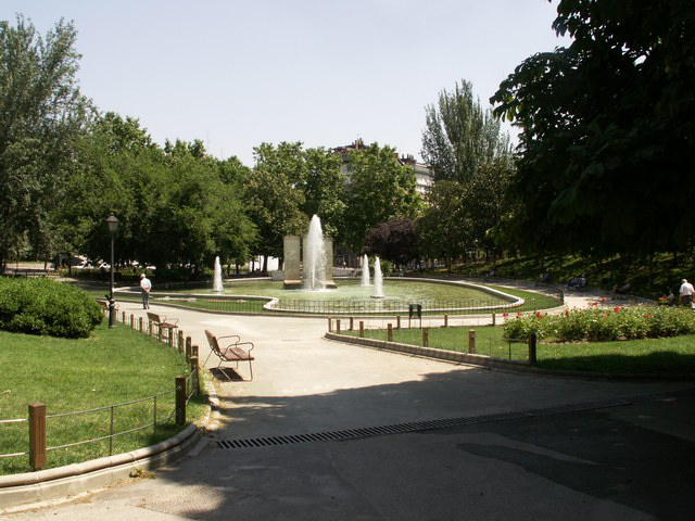 Parque de Berlín. Fuente principal en memoria del "Derribo del Muro de Berlín".